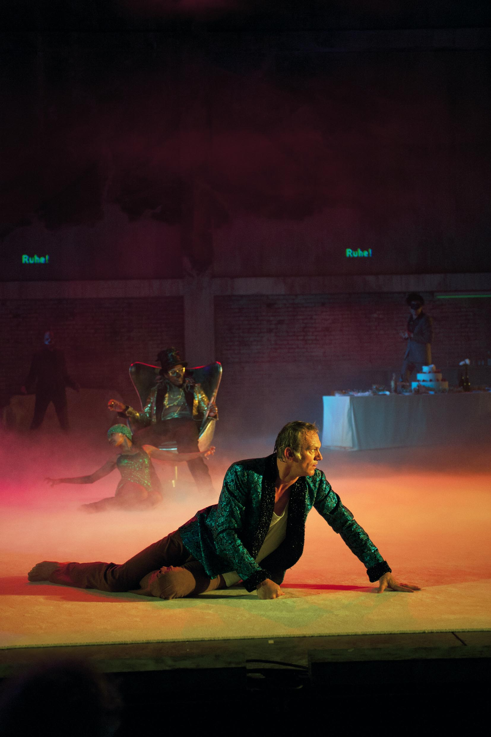 Salzburger Festspiele 2012: Ingvar Eggert Sigurðsson in der Titelrolle von Henrik Ibsens Peer Gynt